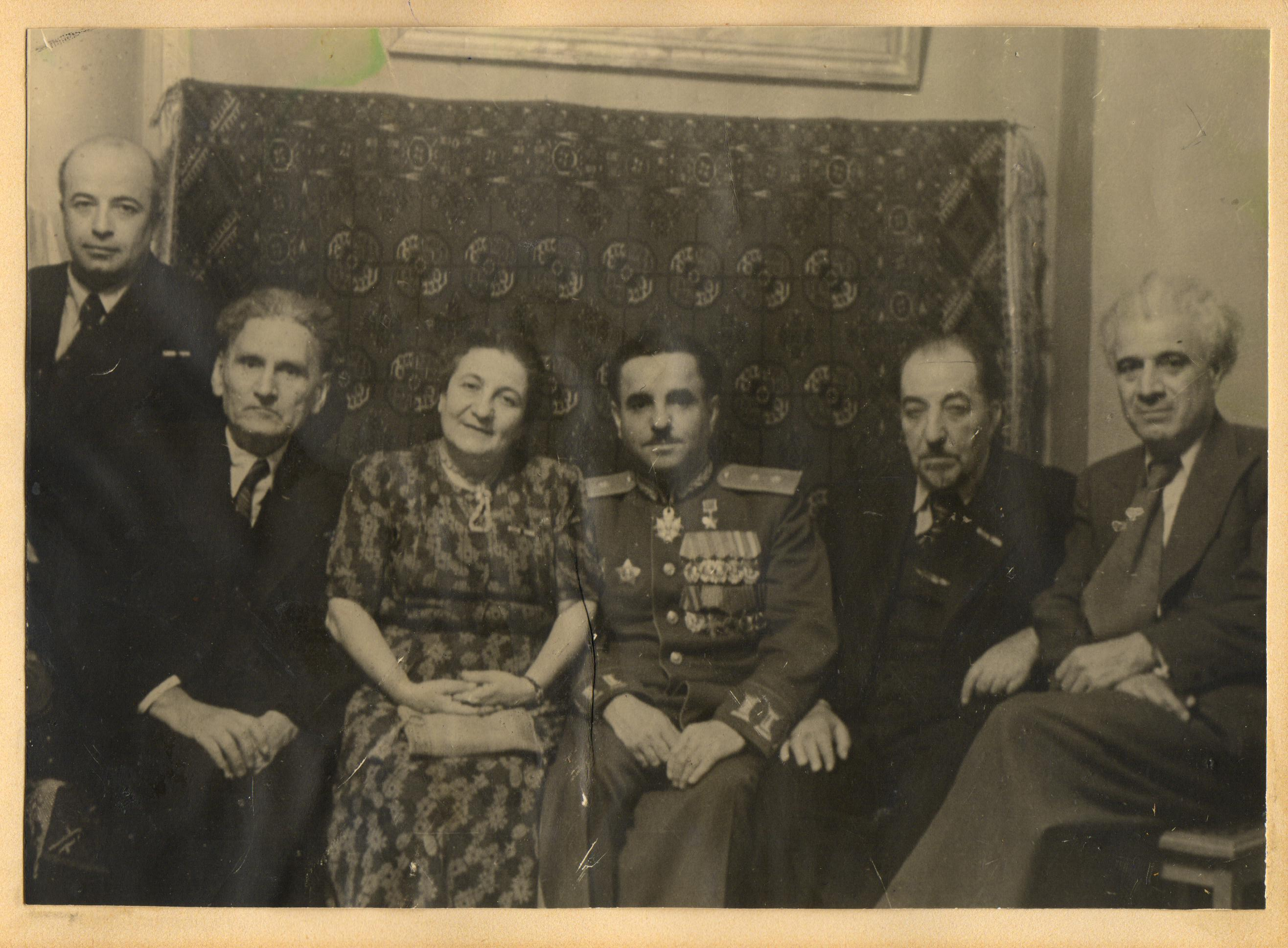 1945թ. Արա Սարգսյան, Մարտիրոս Սարյան, Հայկանուշ Դանիելյան, Ս. Մարտիրոսյան, Ավետիք Իսահակյան, Վաղարշ Վաղարշյան